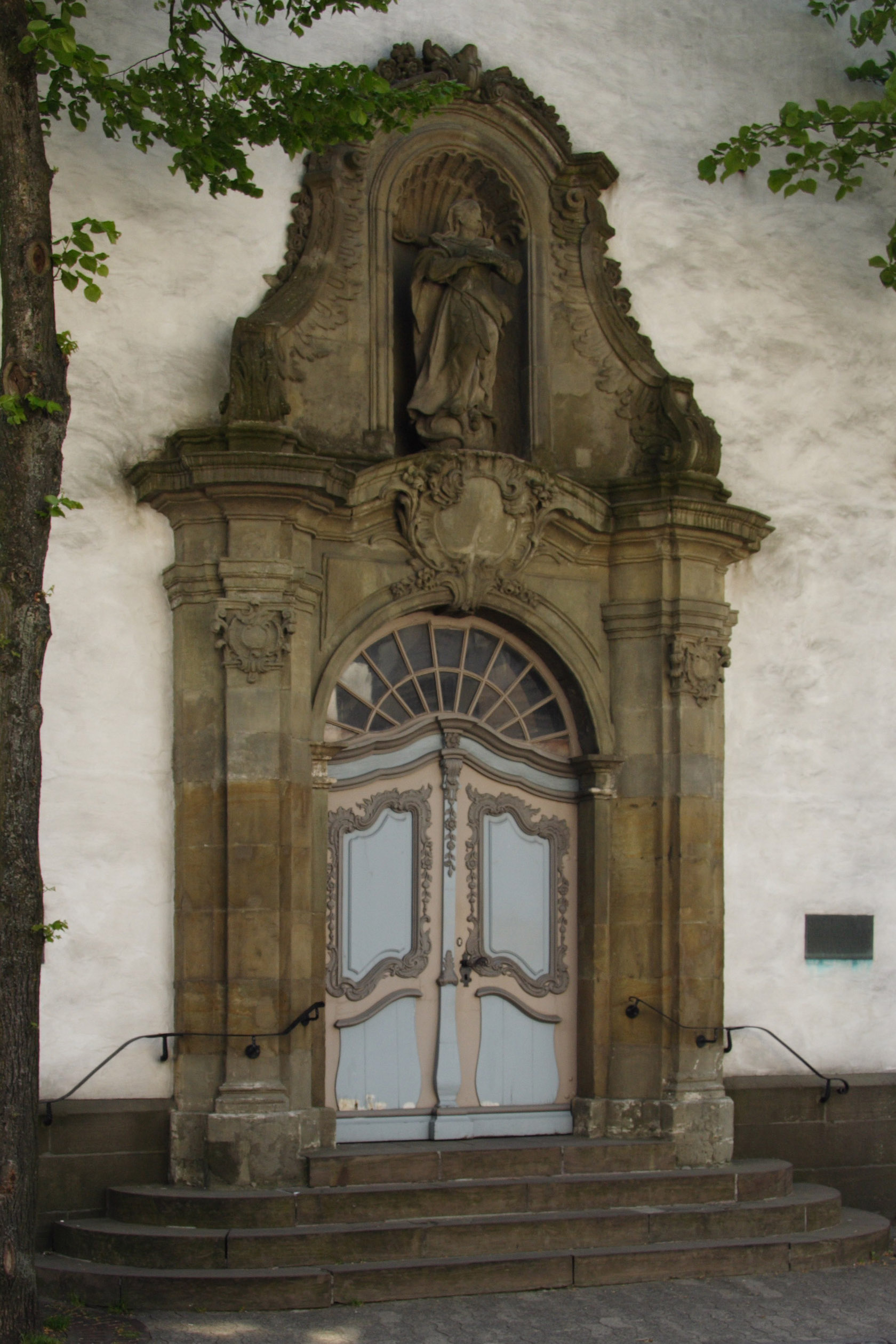 Westportal in der Nikolaikirche Brilon